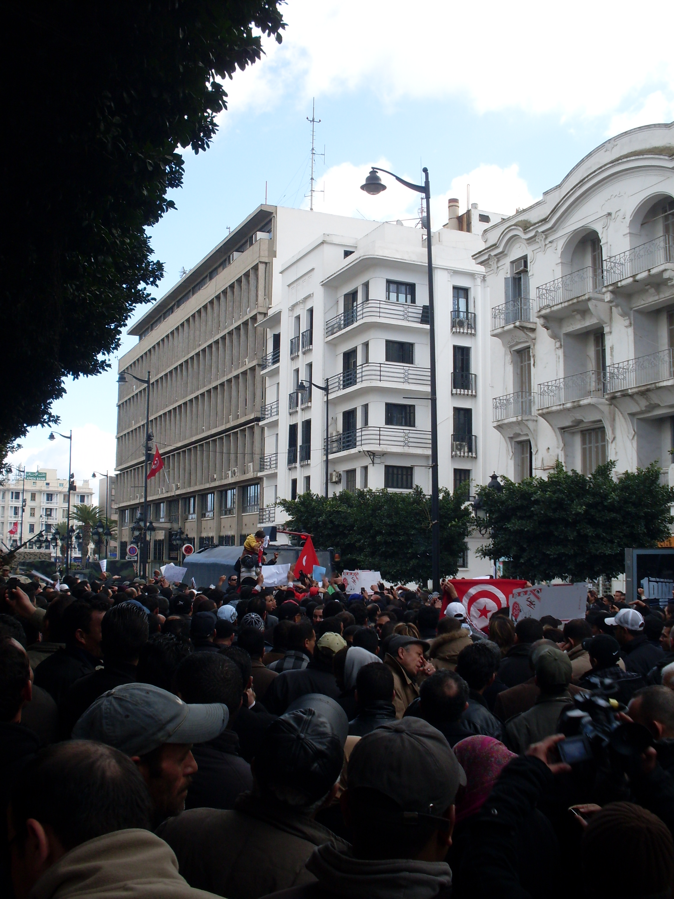 Manif des agents du ministère de l'intérieure à l'avenue Habib Bourguiba lors de la révolution de jasmin